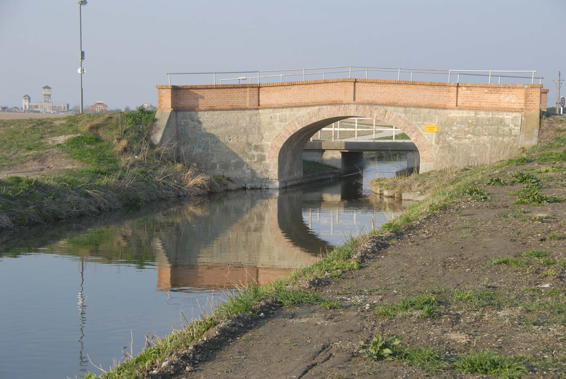 Die restaurierte Schafflerbrücke über den Kanal bei Lichtenwörth. Links im Hintergrund das ehemalige Tritolwerk (Sprengstofferzeugung)